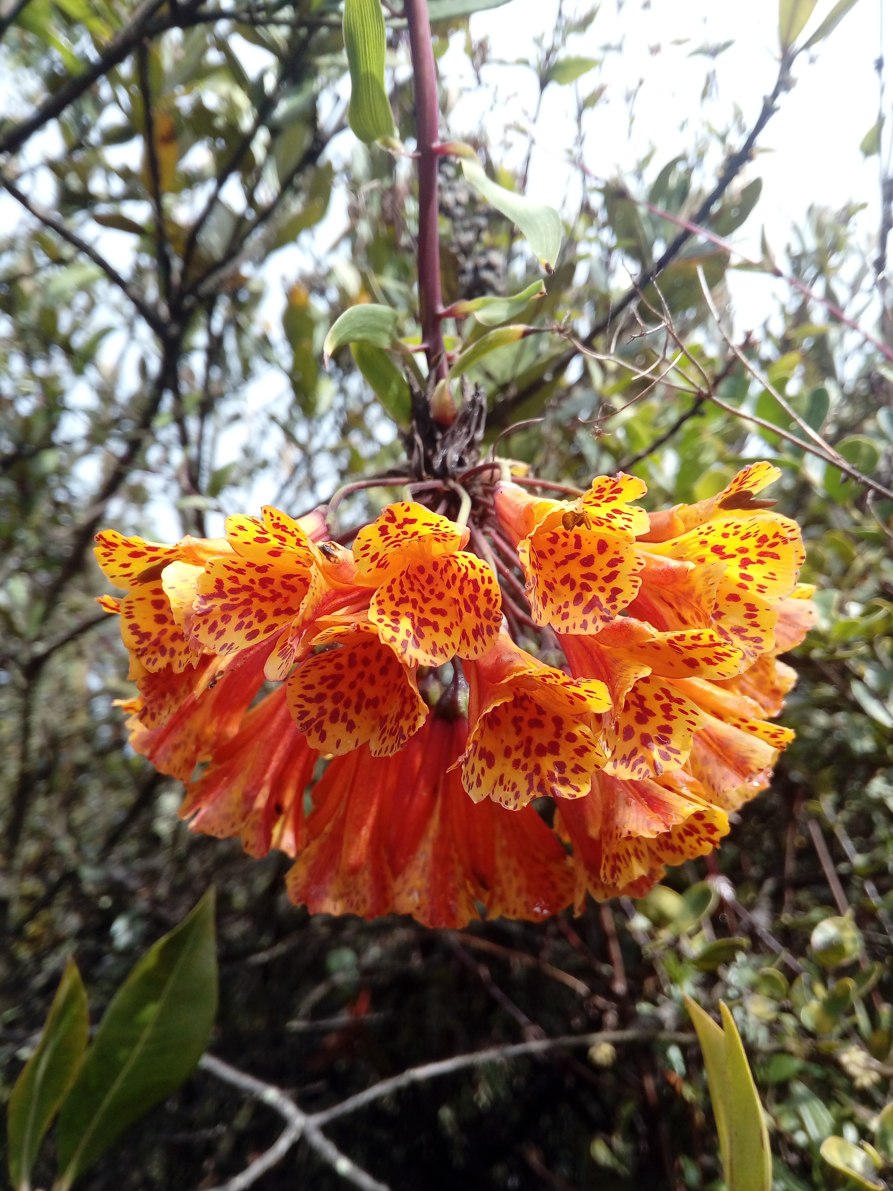 Flores de Bomarea sp